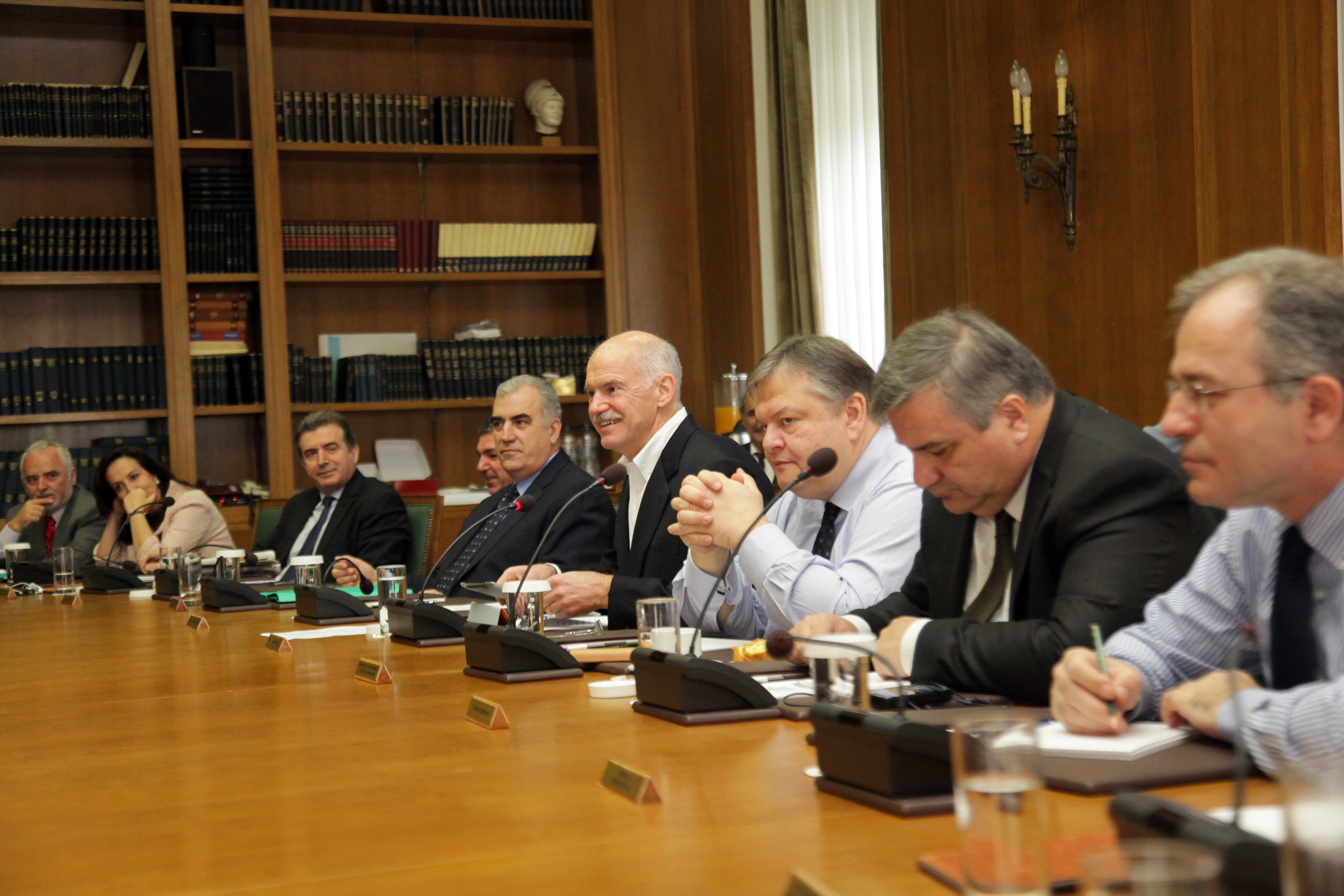 Συνεδρίαση του Υπουργικού Συμβουλίου Αίθουσα Υπουργικού Συμβουλίου, Κοινοβούλιο 8 Νοεμβρίου, 2011